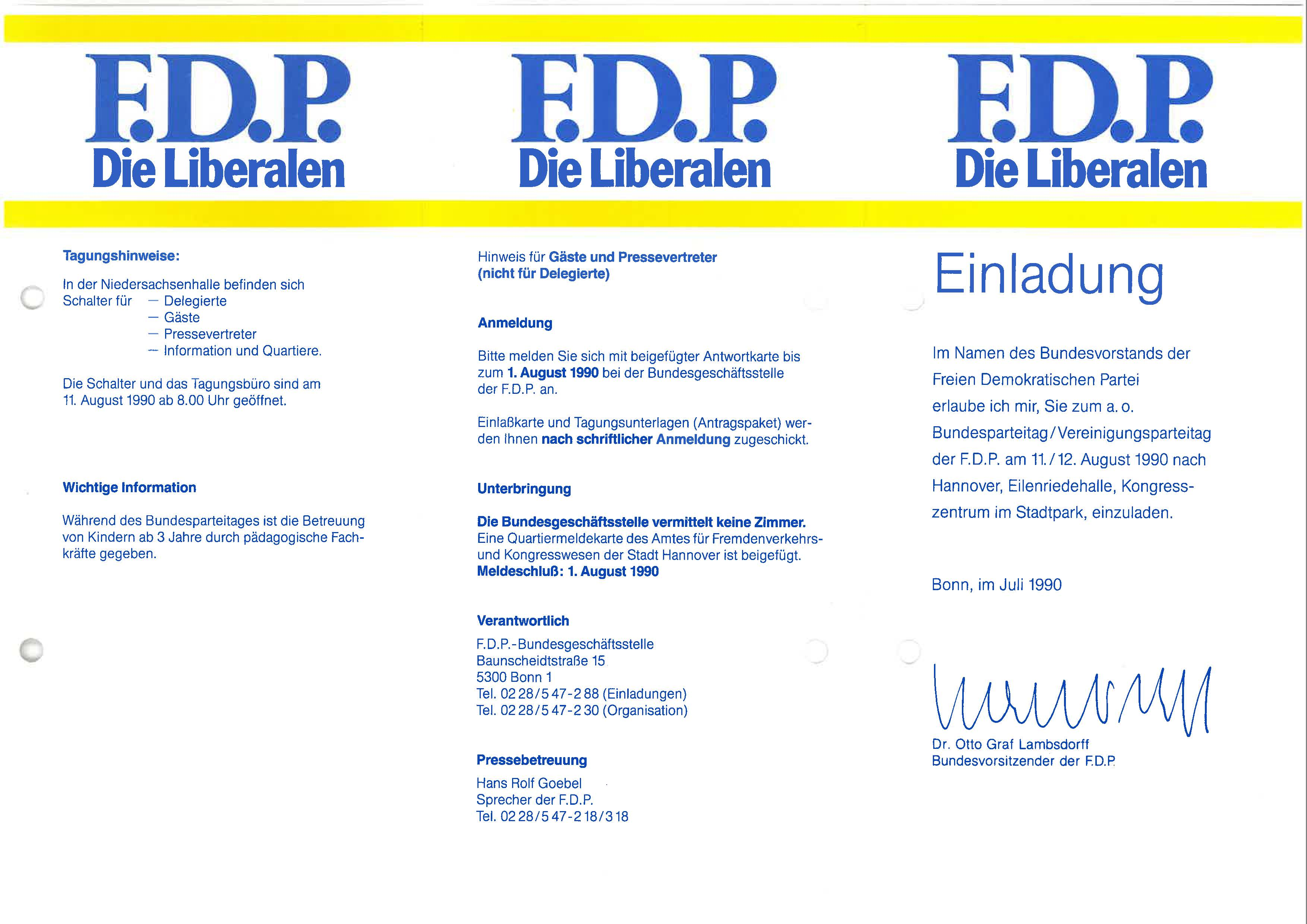 Einladung zum Vereinigungspartei 1990